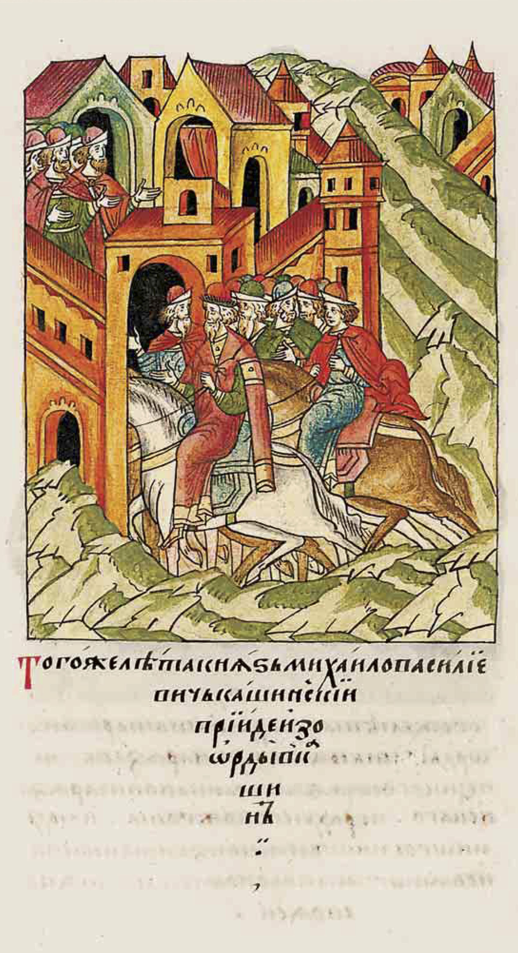 ЛИЦЕВОЙ ЛЕТОПИСНЫЙ СВОД В том же году князь Михаил Васильевич Кашинский пришел из Орды в Кашин.